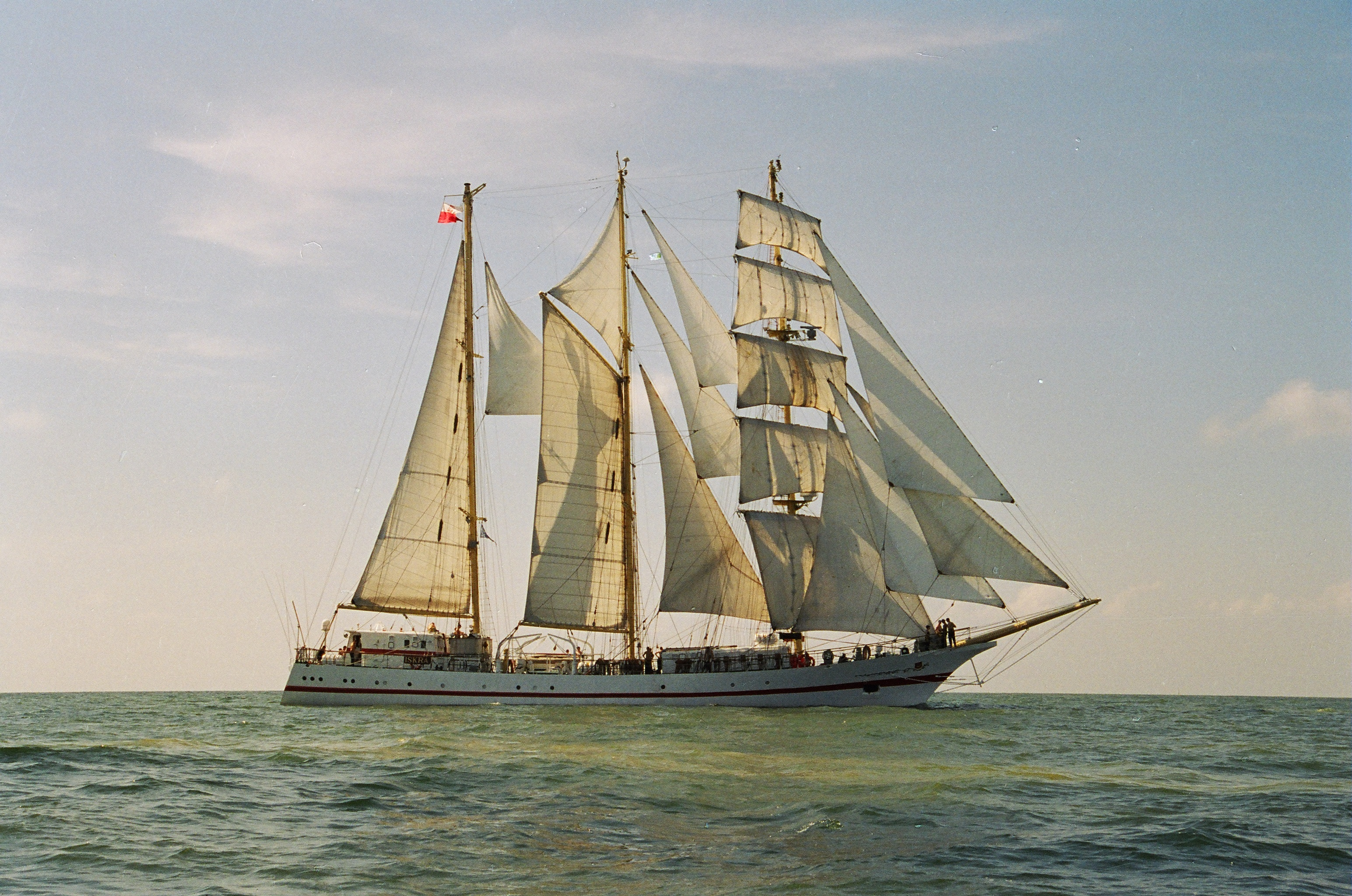 ORP Iskra na morzu północnym.